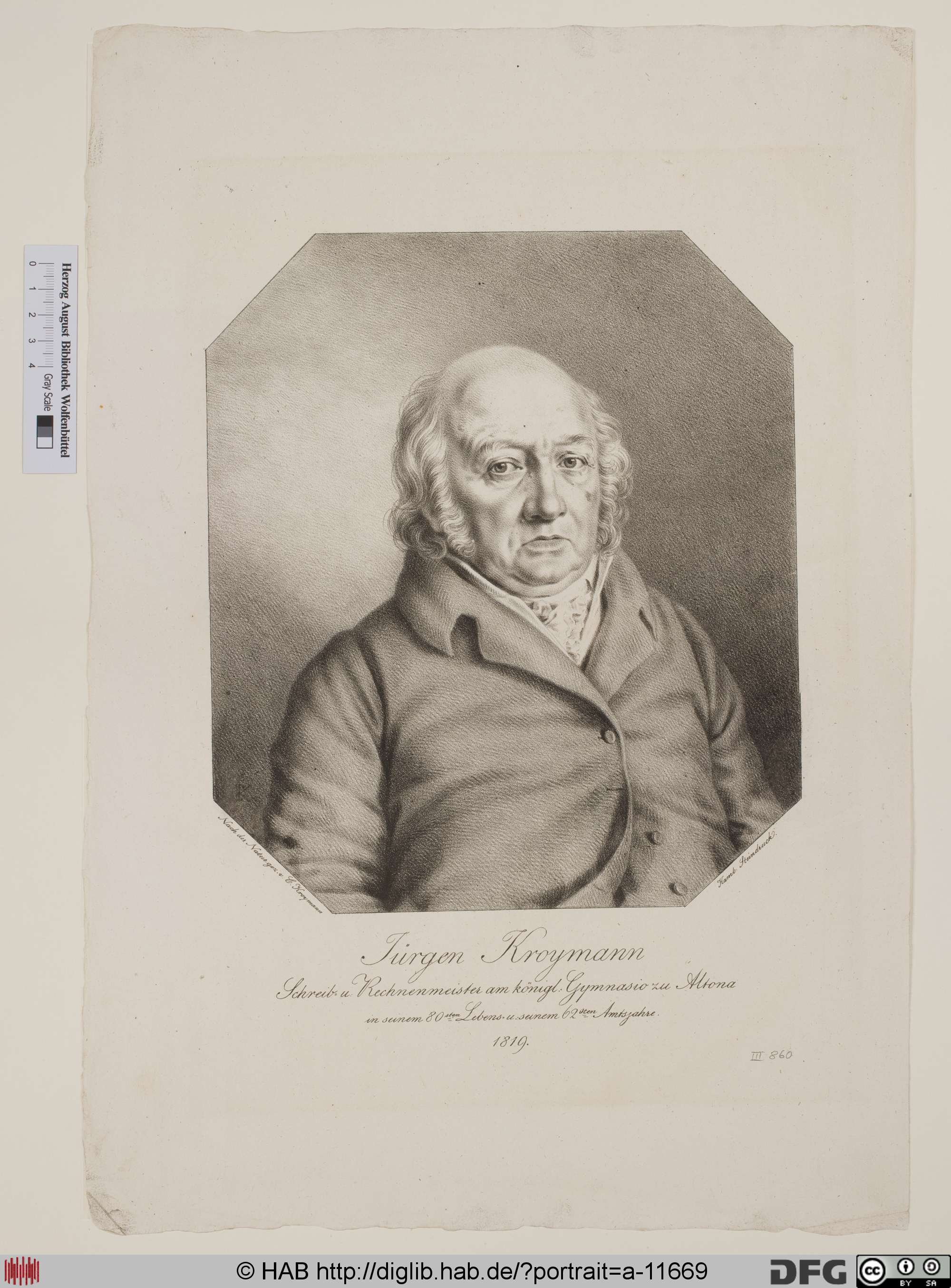 Jürgen (auch Georg) Kroymann, 1794 Schreib- u. Rechenmeister am Altonaer Gymnasium, vorher Lehrer in Eckernförde